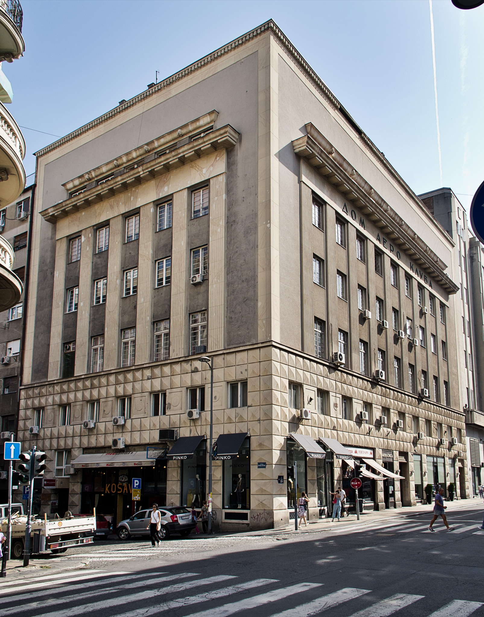 Зграда Аеро клуба, угао Узун Миркове 4 и Краља Петра 36, Стари град, Београд, Србија